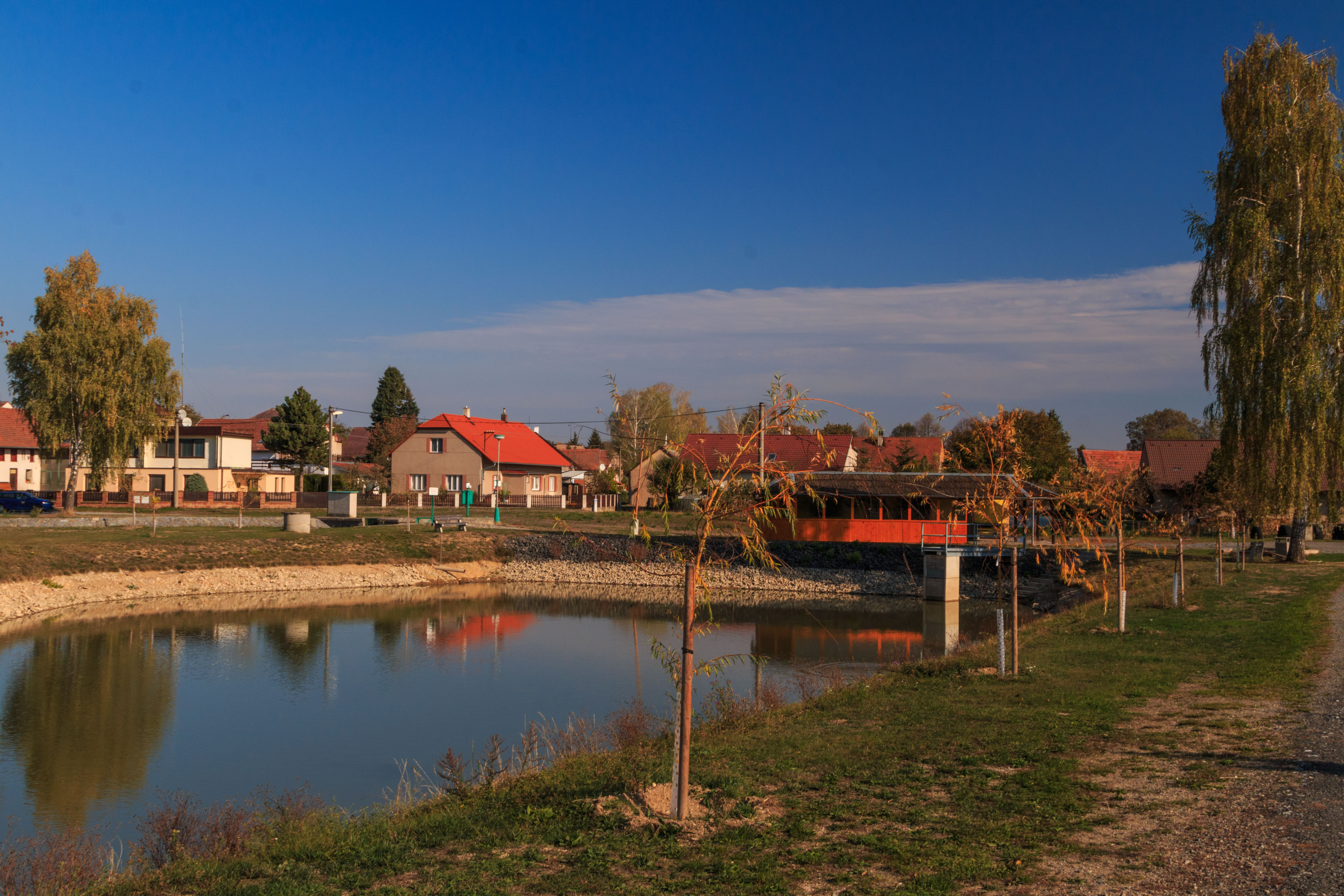 Rybník u jezu v Zaječicích Project: Vodstvo. Ticket: 1617.